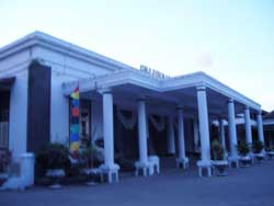 Auvent de la SMA Negeri 3 (lycée d'Etat) de Semarang